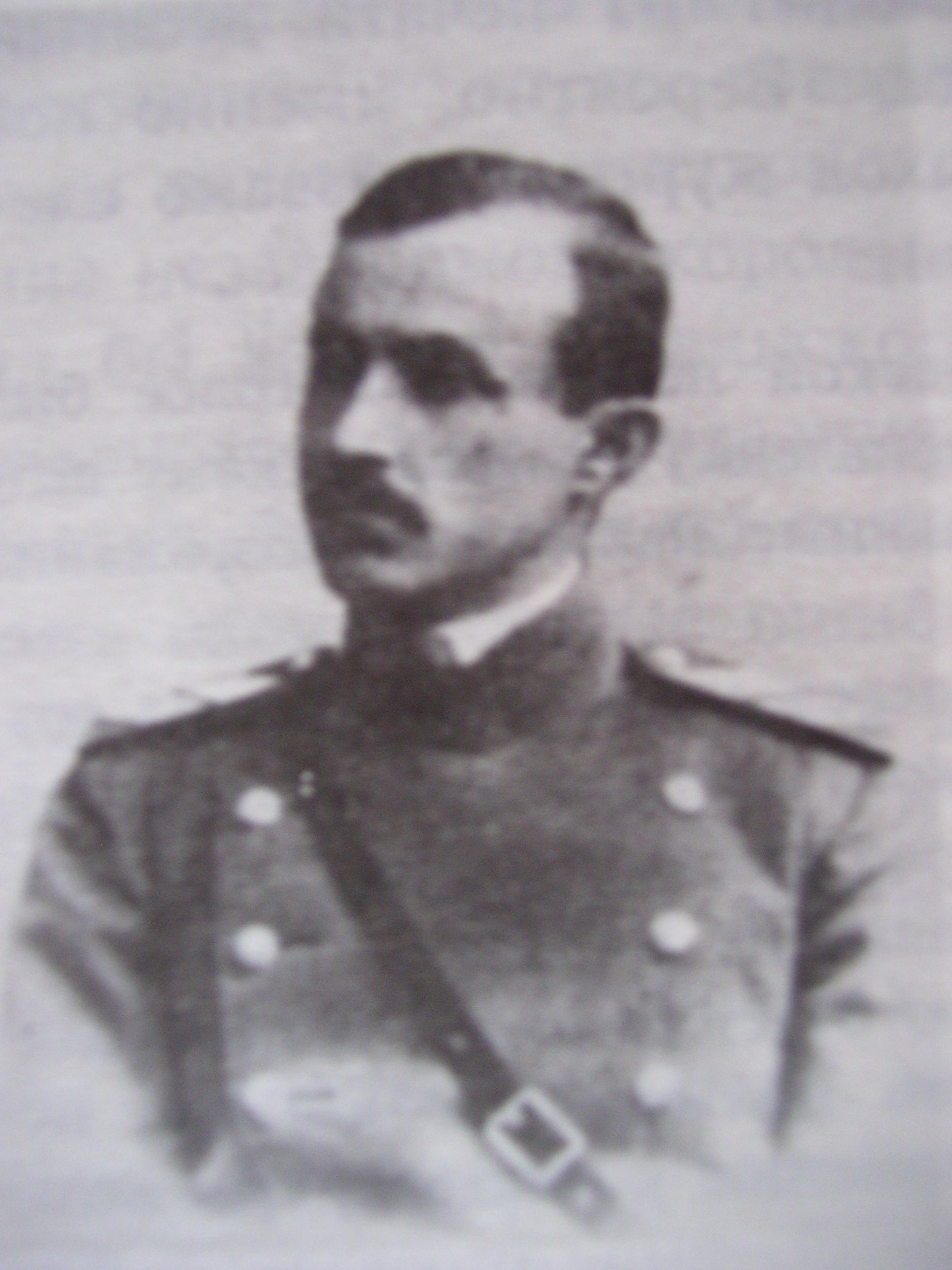 Гаврил Константинович